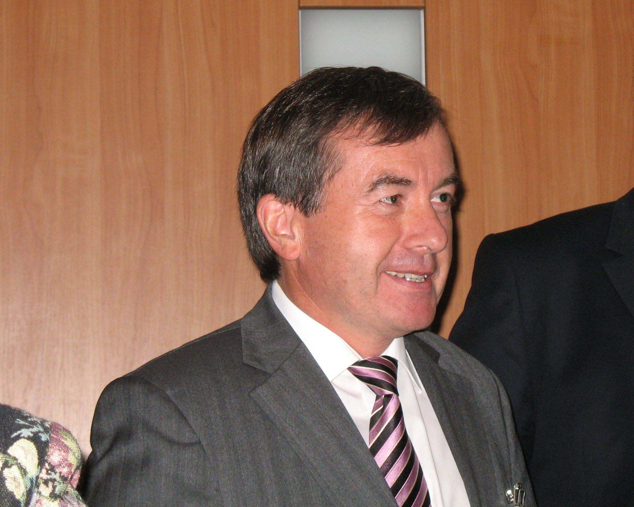 Prezes Solaris Bus & Coach Krzysztof Olszewski w Kielcach na targach Transexpo 2007.